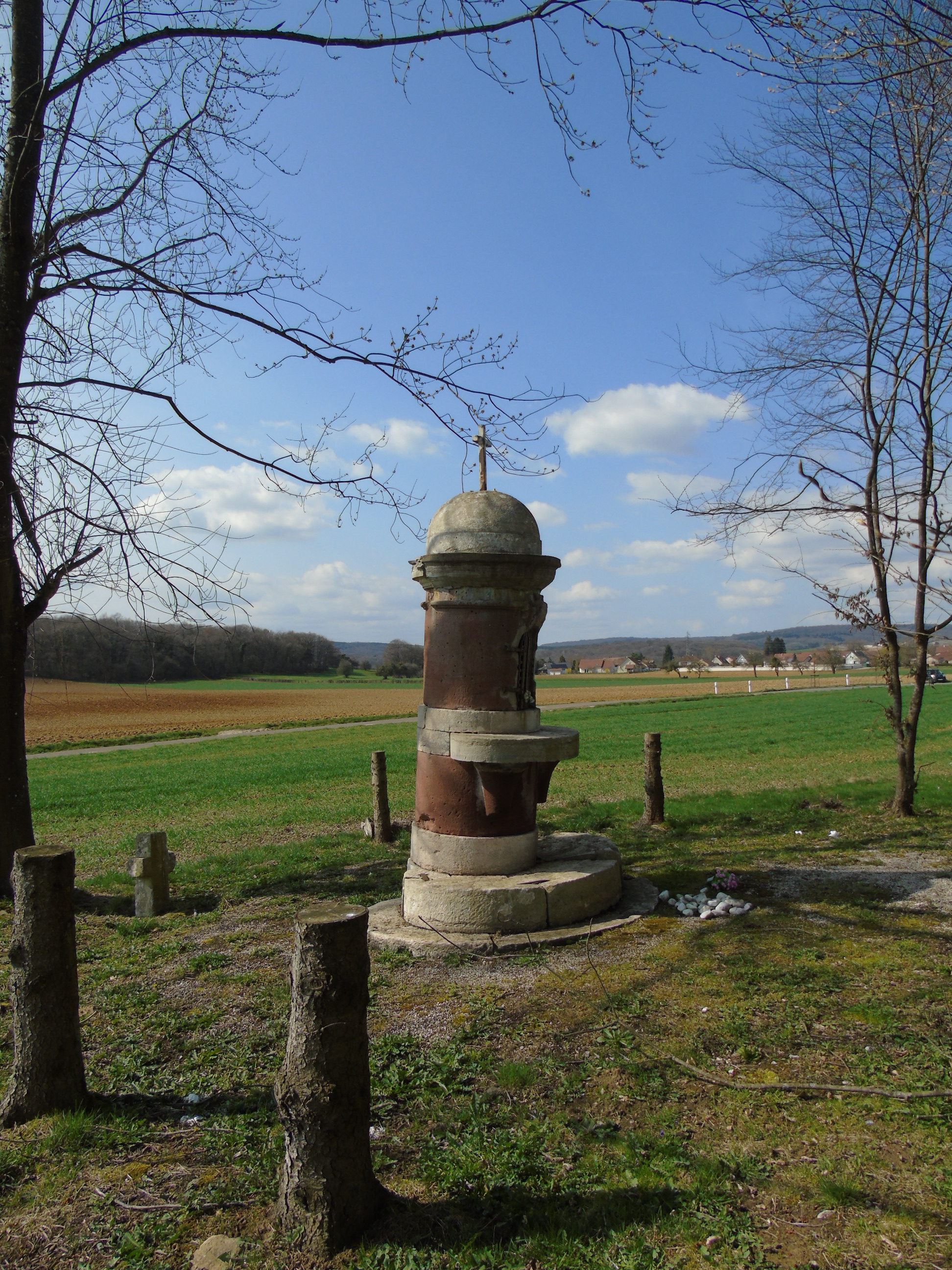 Oratoire Notre Dame de la Grêle, Arcey, Doubs, France